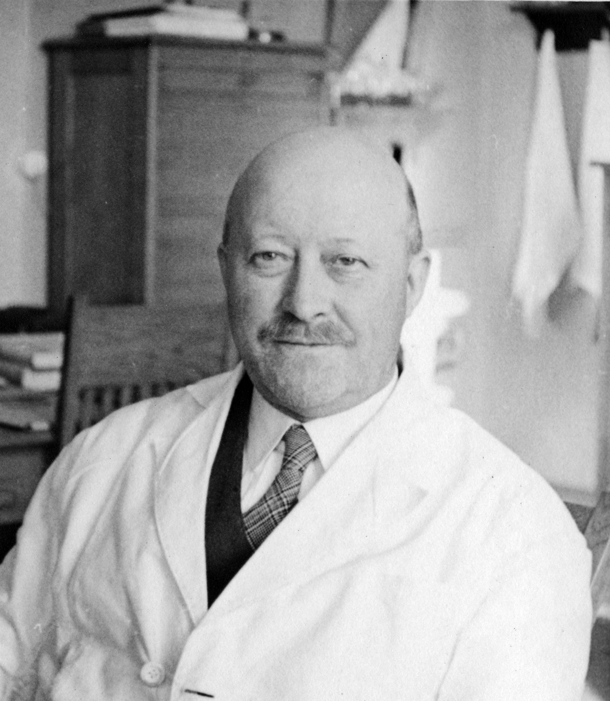 Format: Fotopositiv Dato / Date: Mars / April 1940 Fotograf / Photographer: Ukjent, mulig Johan Eggen Sted / Place: NTH, Trondheim Eier / Owner Institution: Trondheim byarkiv, The Municipal Archives of Trondheim Arkivreferanse / Archive reference: Tor.H42.B58.F4197 Merknad: Fra Johan Eggens privatarkiv. Olav Heggstad (1877 - 1954), uteksaminert fra Fagavdelingen for Ingeniørvesen ved Trondhjems Tekniske Læreanstalt (TTL) i 1896, videreutdannet seg innen vannkraftutbygging og elektroteknikk ved Technische Hochschule Dresden. Jobbet en stund for Siemens & Halske i Tyskland, ble så ansatt i Norsk Hydro i forbindelse med utbyggingen av Norsk Hydros fabrikkanlegg på Rjukan og kraftstasjonen på Vemork. Heggstad underviste i vassbygging ved NTH og var rektor ved skolen i to omganger; første gang 1929 - 1933 og andre gang 1942 - 1945. Kilde: Store Norske Leksikon I følge Trondhjems Tekniske Læreanstalts karakterprotokoller var Olav Heggstad født 05.04.1877 i Namsos; sønn av skolebestyrer i Steinkjer Christopher Marius Hægstad og Pernille f. Midgard. Han tok middelskoleeksamen (engelsklinjen) ved Namsos skole i 1892 med hovedkarakter 1,17. Samme år ble han tatt opp som student ved TTL hvor han gikk fagavdelingen for Ingeniørvesen. Han ble uteksaminert 30 juli 1896 med snittkarakter 1,45. Kilde: Register til Karakterprotokollene for Trondhjems Tekniske Læreanstalt 1870-1914, fol. 92